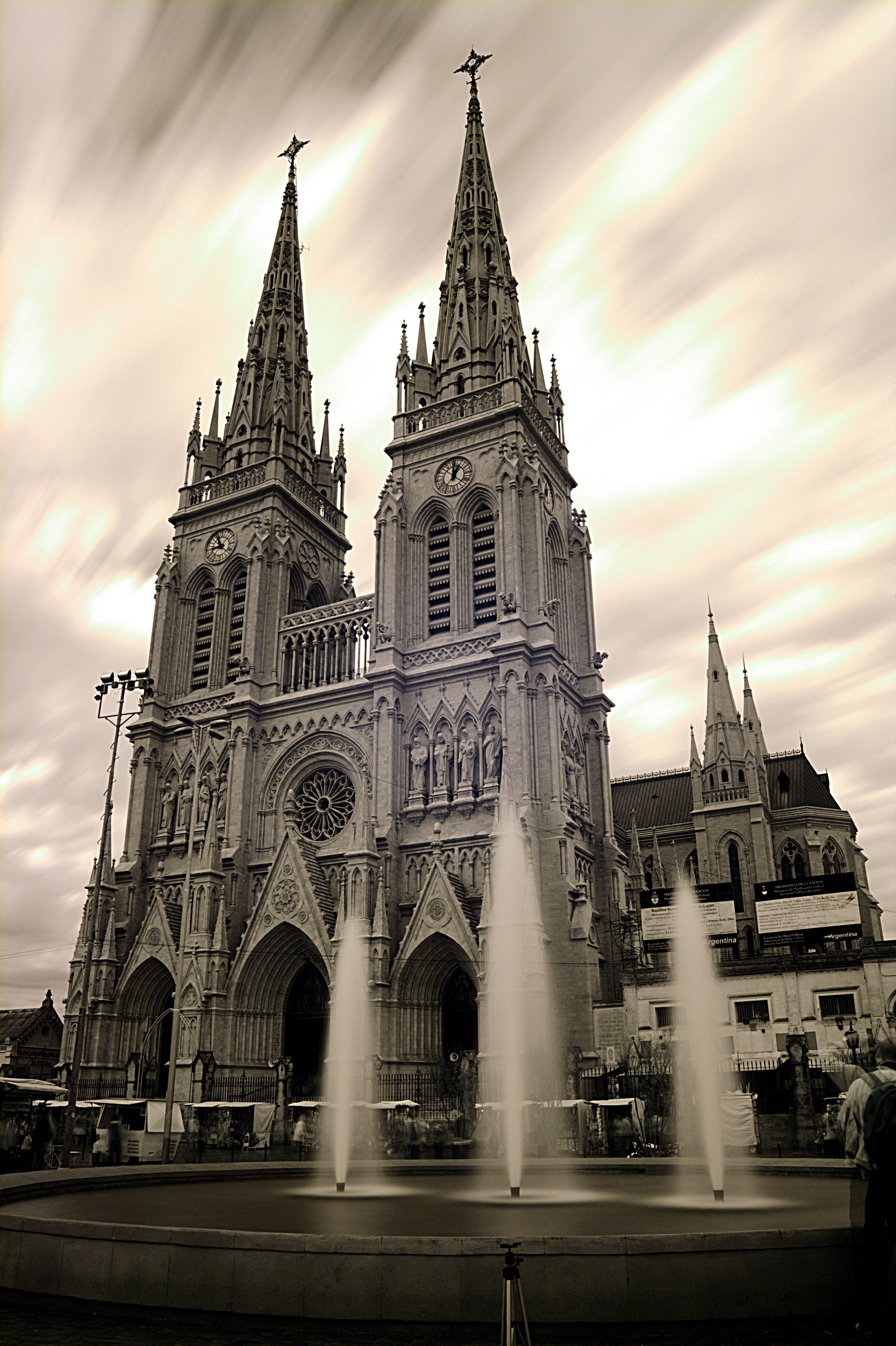 Basílica de Nuestra Señora de Luján, Luján, provincia de Buenos Aires, Argentina.